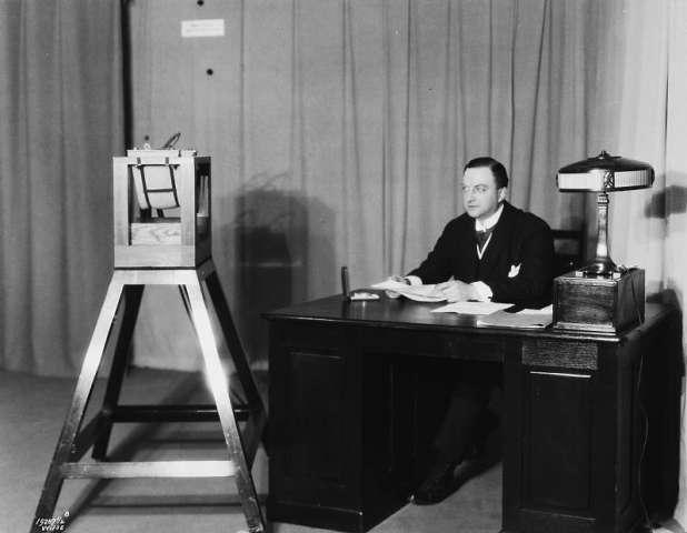 Gustav Berg-Jæger i Kringkastingsselskapet A/S i 1925